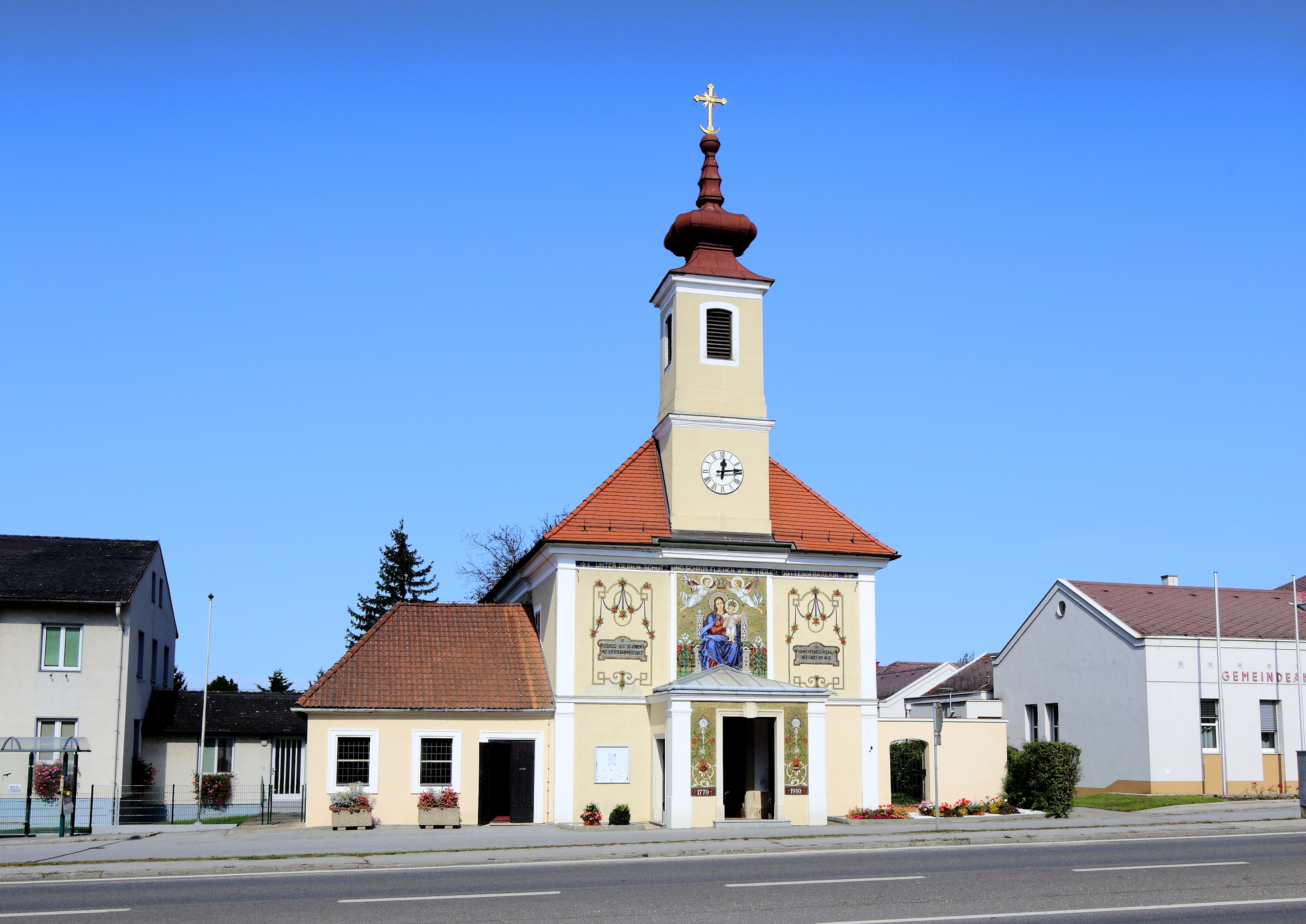 Südansicht der Pfarr- und Wallfahrtskirche Unsere Liebe Frau in Maria Ellend, ein Ortsteil der niederösterreichischen Gemeinde Haslau-Maria Ellend. Der schlichte Bau mit einem Fassadenturm wurde 1770 errichtet. Im Zuge einer Innen- und Außenrenovierung sowie einem teilweise Umbau 1910 wurde auch das Fassadenmosaik angebracht.